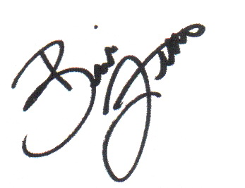 Brian Littrell's autograph